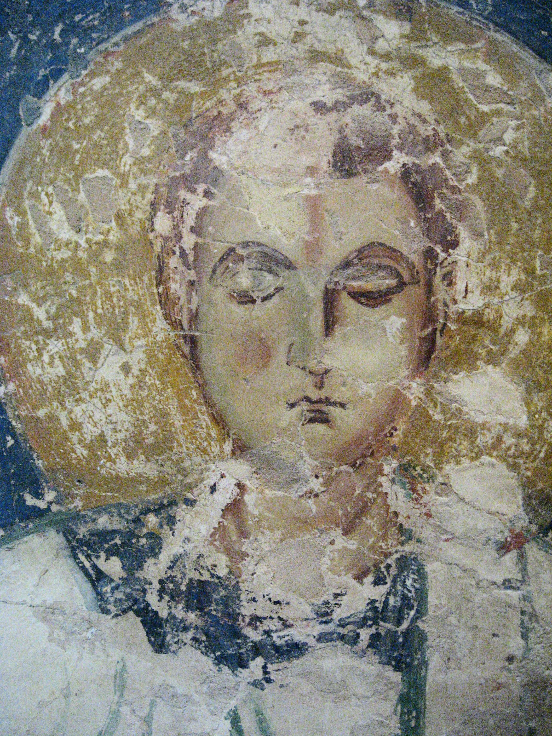 Фреска 1125 г. Лик диакона.